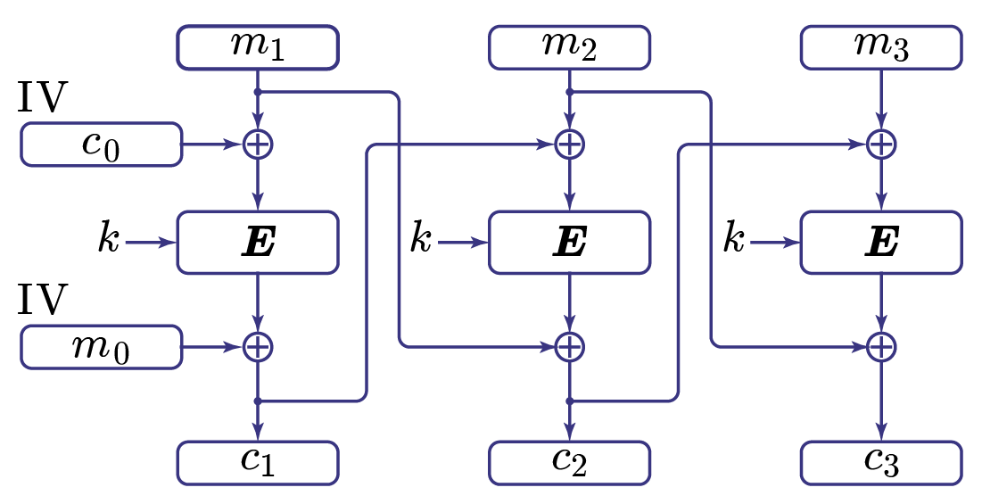 תיאור מצב הפעלה IGE